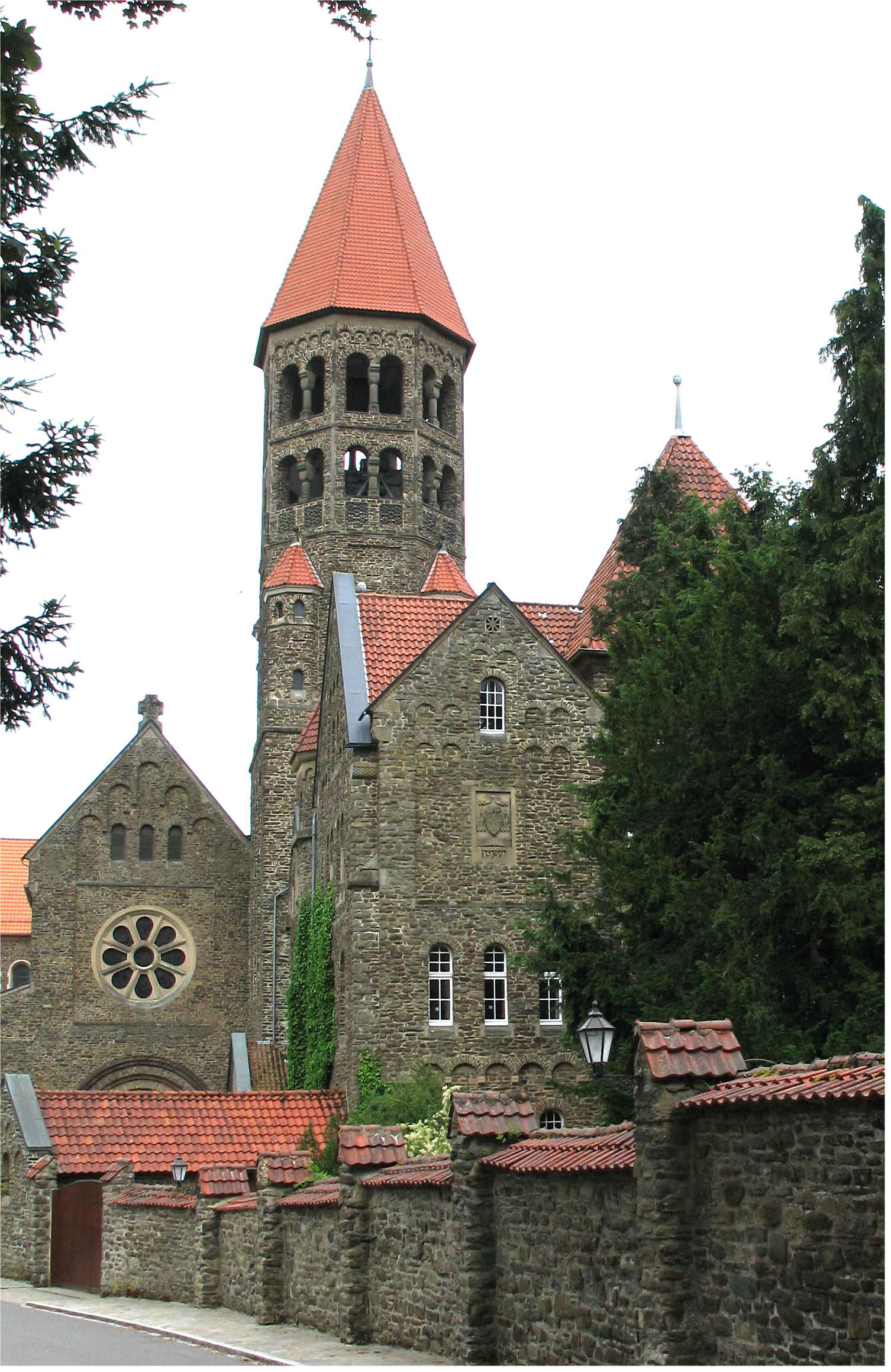 D'Benediktinerabtei vum Hëllege Mauritius zu Klierf